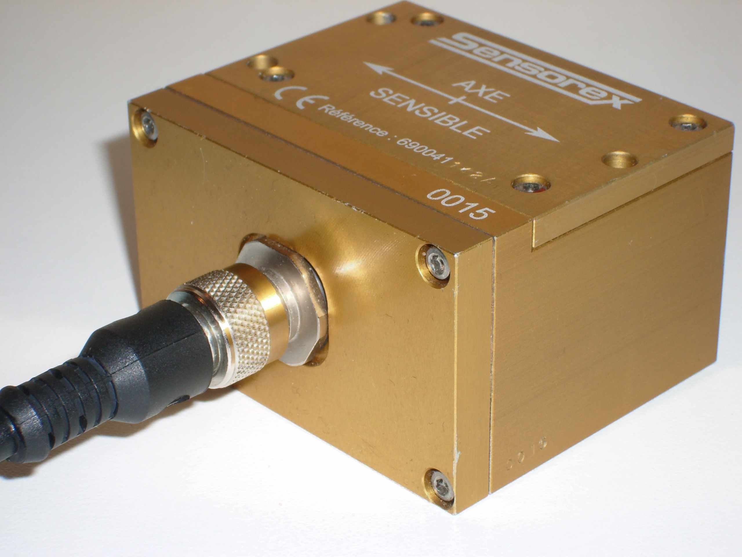 Inclinomètre numérique à galvanomètre balourdé SENSOREX